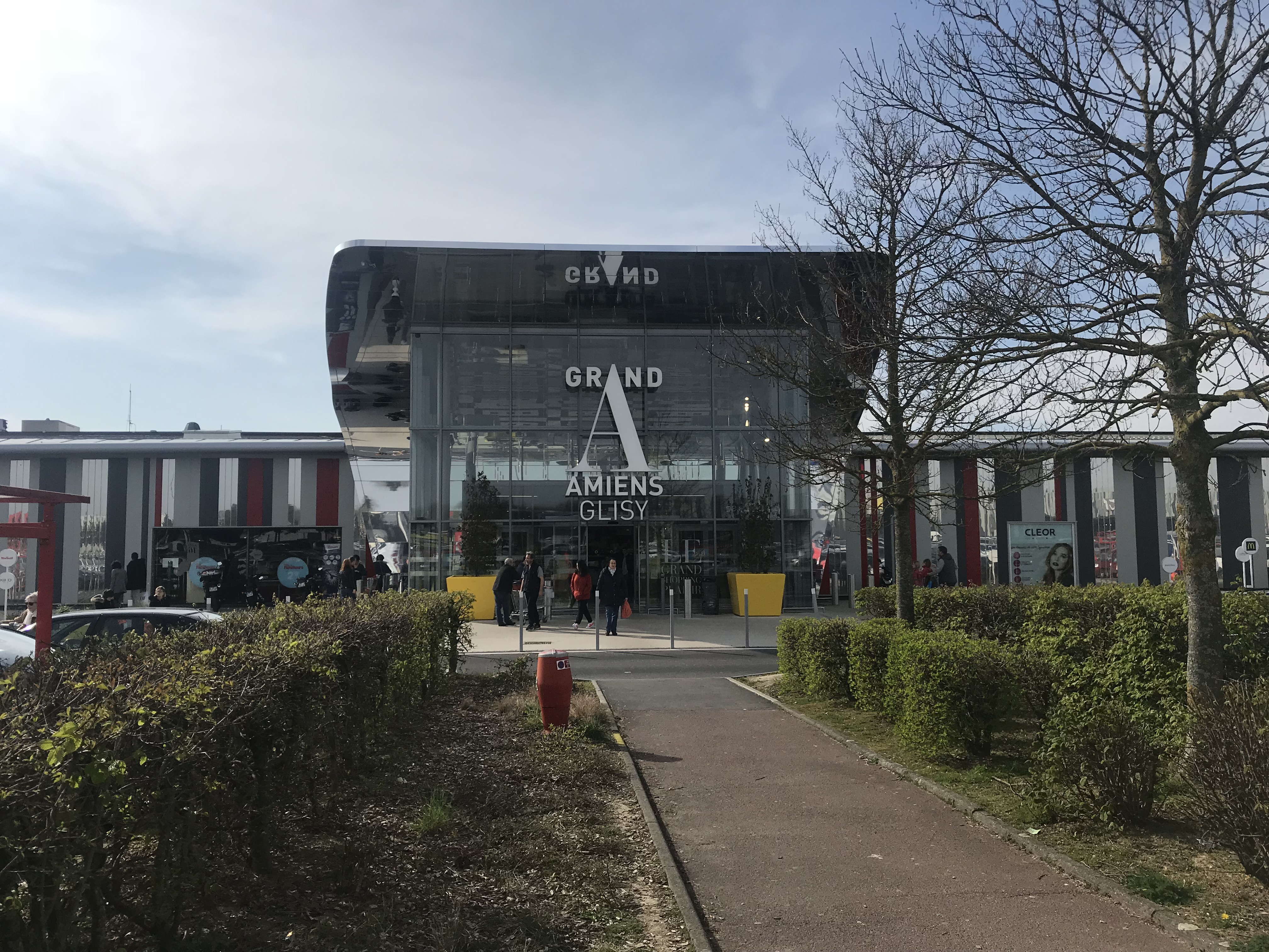 centre commerciale de Glisy